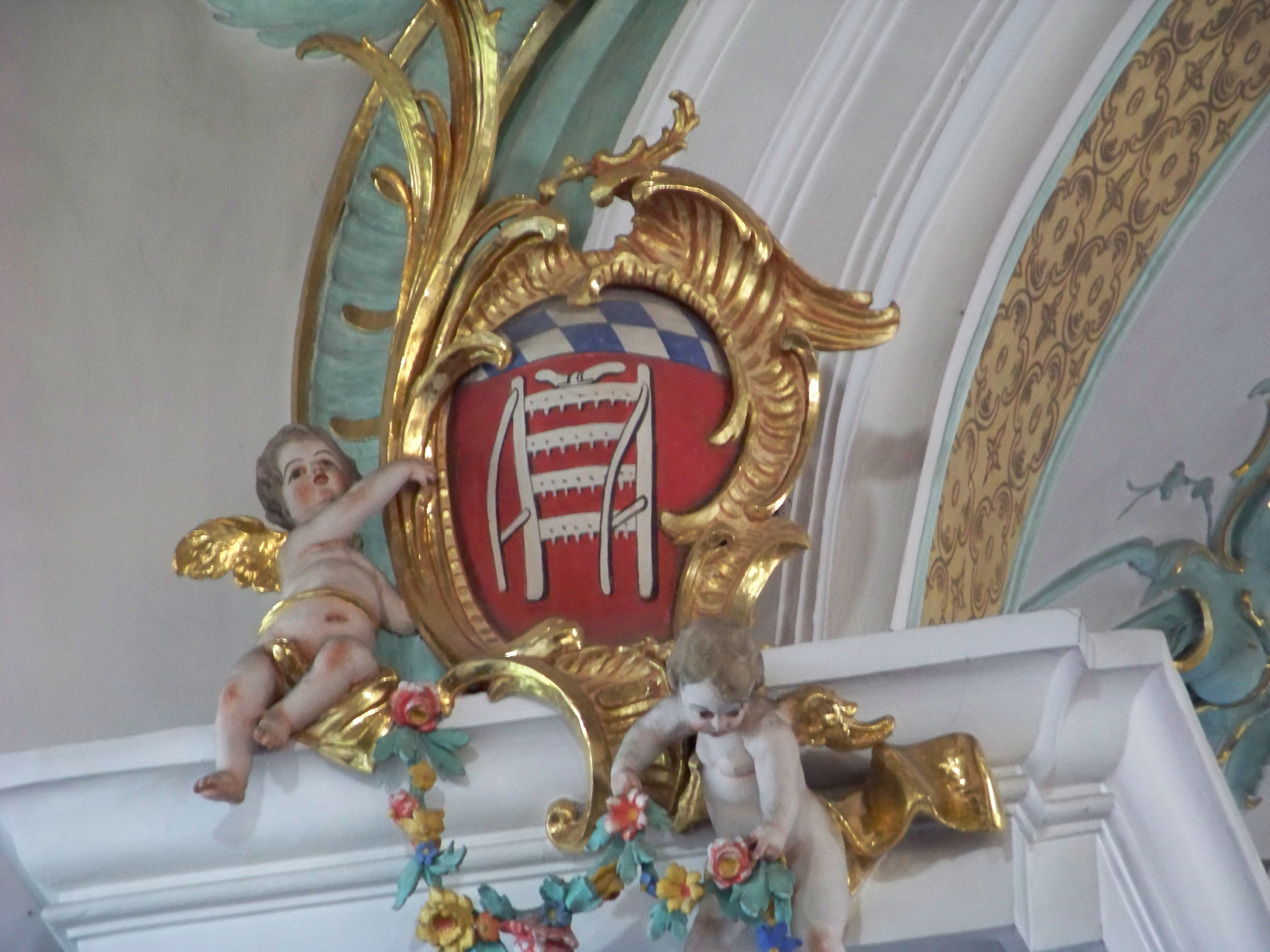 Geiselhöring, Schlossgraben 17. Katholische Stadtpfarrkirche St. Petrus und Erasmus. Barockes Langhaus, 1761-64 von Georg Fischer. Links am Chorbogen halten Putten das Wappen mit der Egge von Geiselhöring.